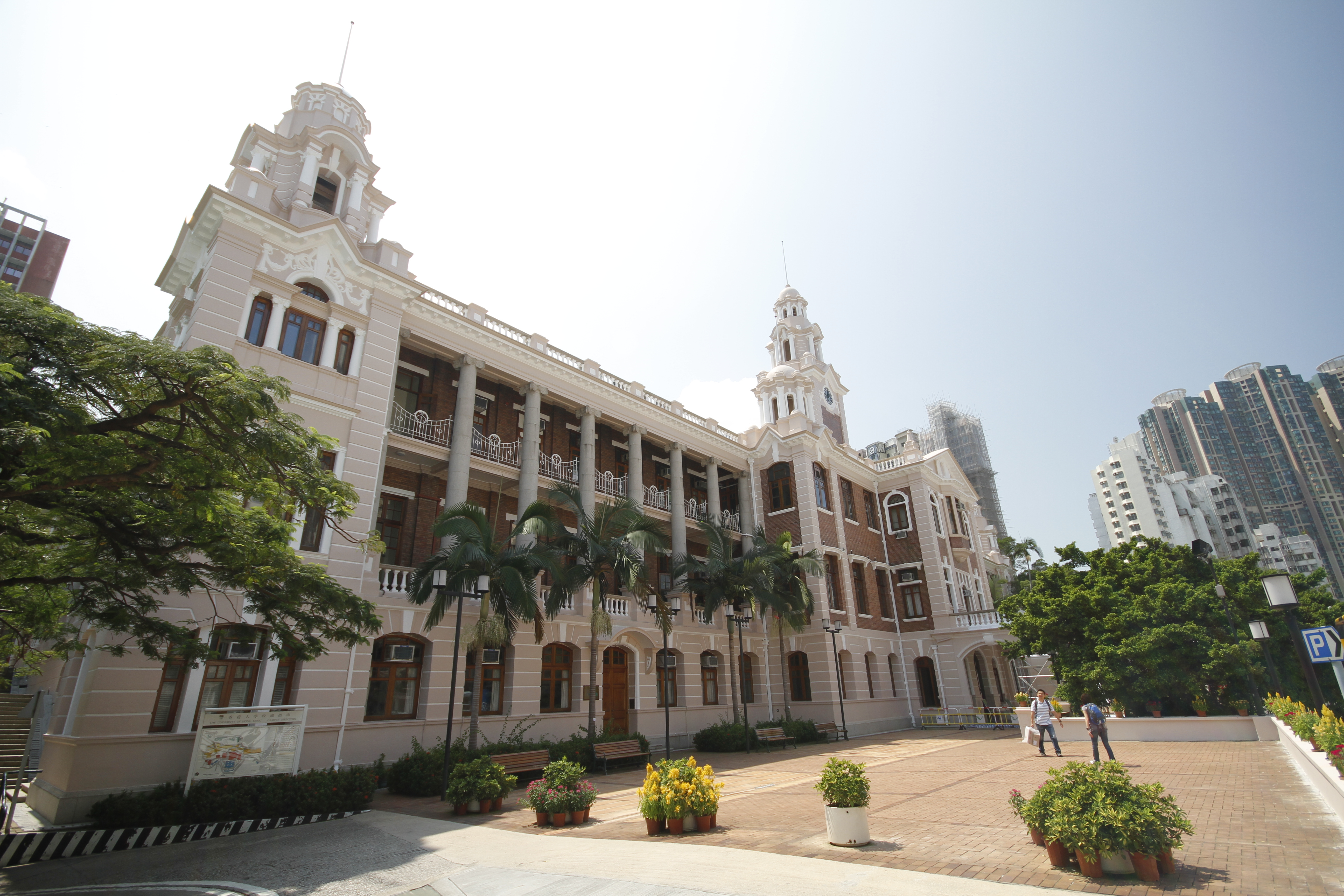 香港大學本部大樓外部